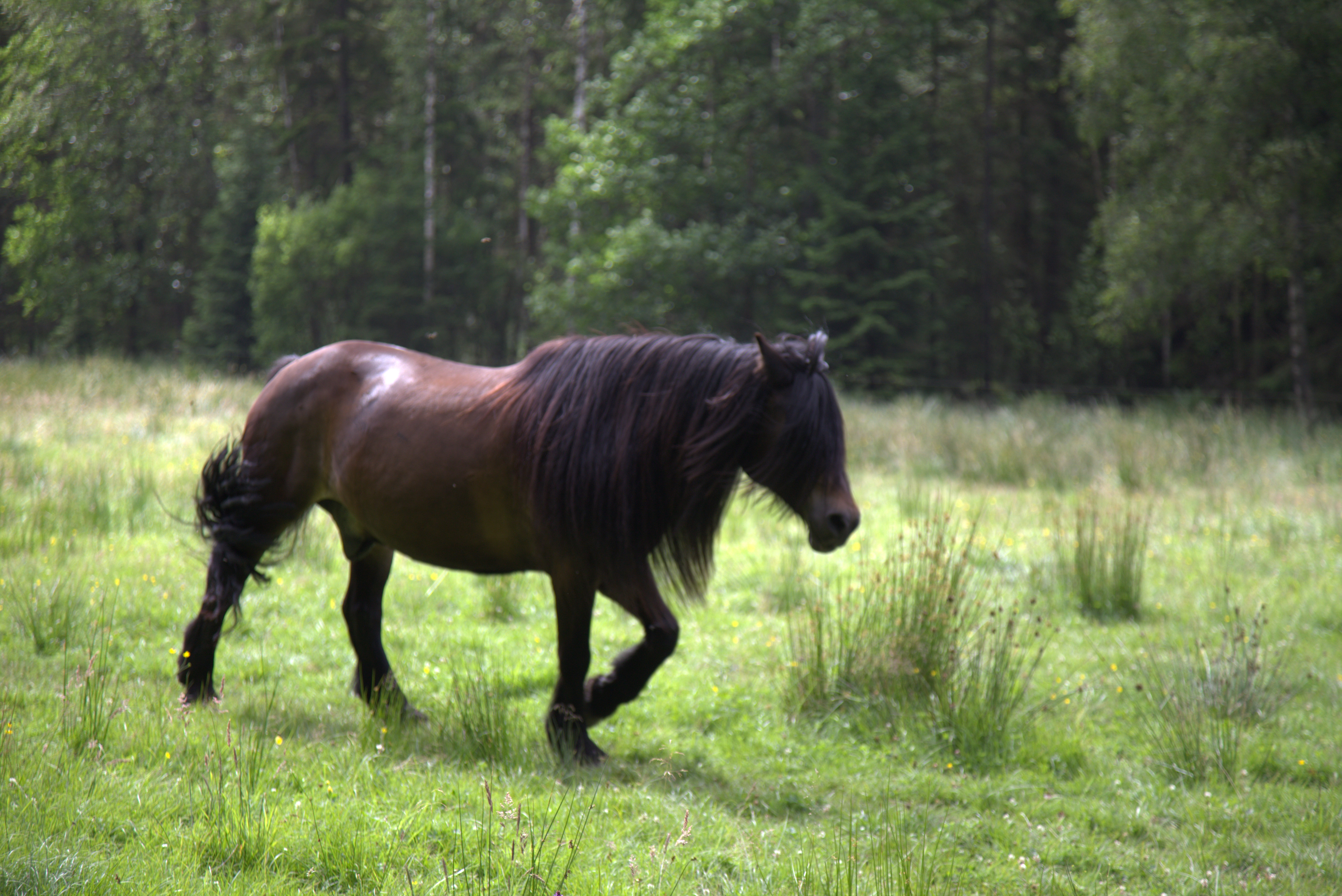 Nordsvensk häst i Äggdalen vid Hålt i Stenungssunds kommun.